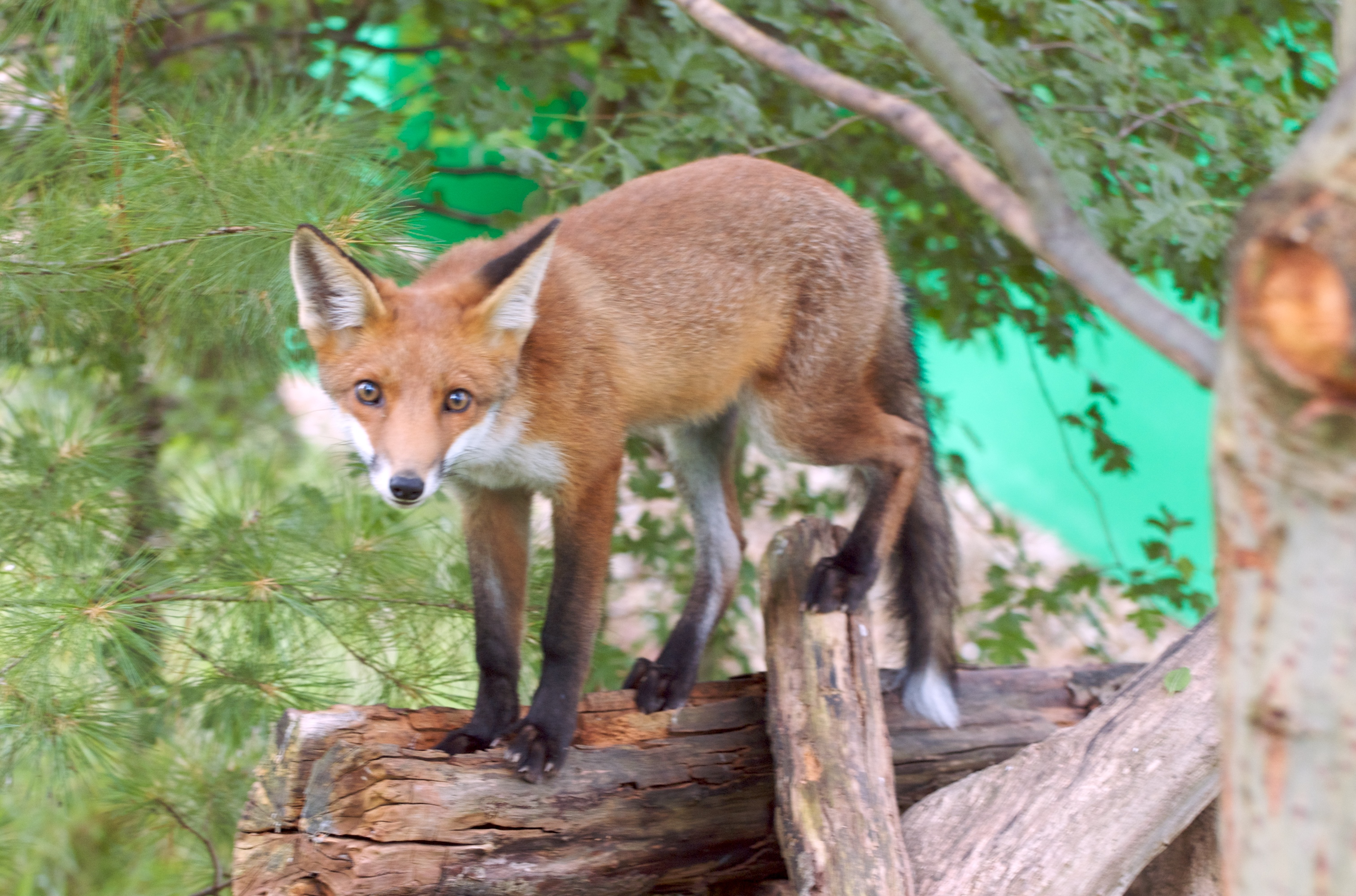 Don't slip, young Pablo!